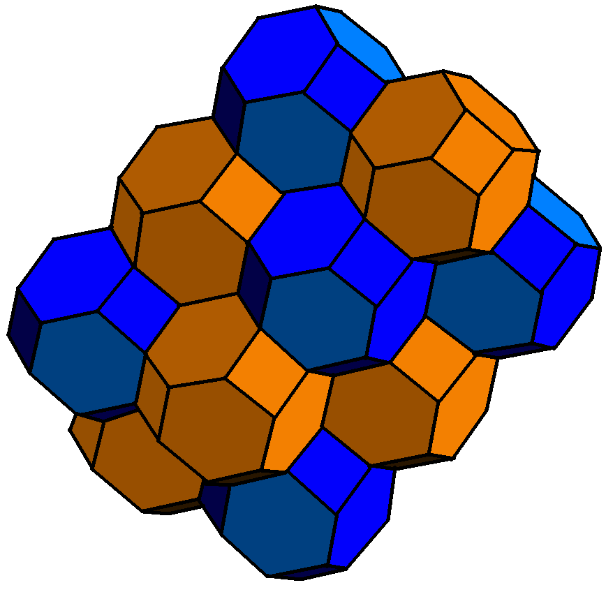 Nid d'abeille cubique bitronqué